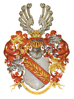 Vaakuna